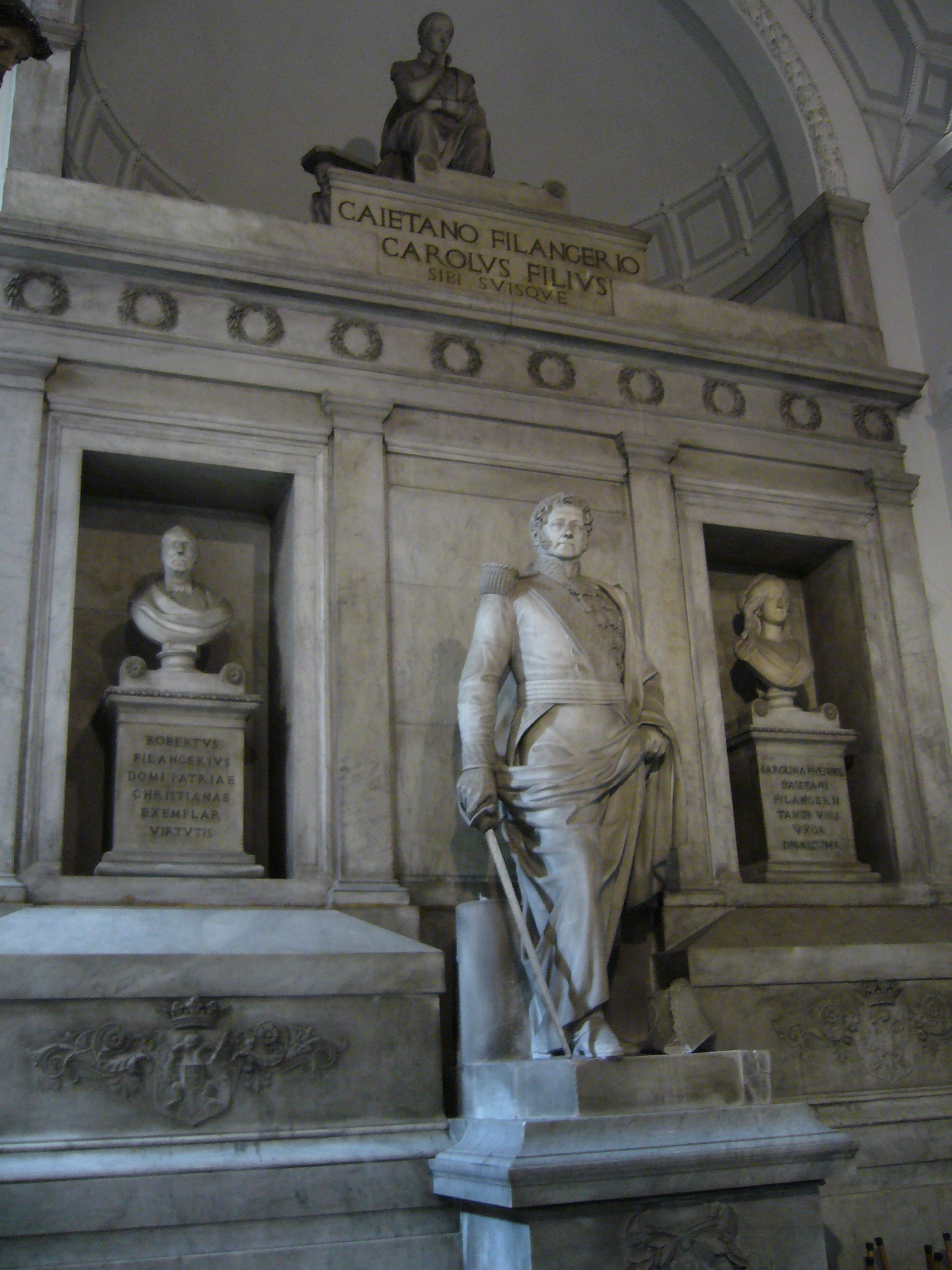 Monumento funebre a Carlo Filangieri (1784-1867), Chiesa di Santa Maria di Piedigrotta, Napoli. Opera di Nicola Renda (1815-1892) su disegno di Enrico Alvino (1810-1876).